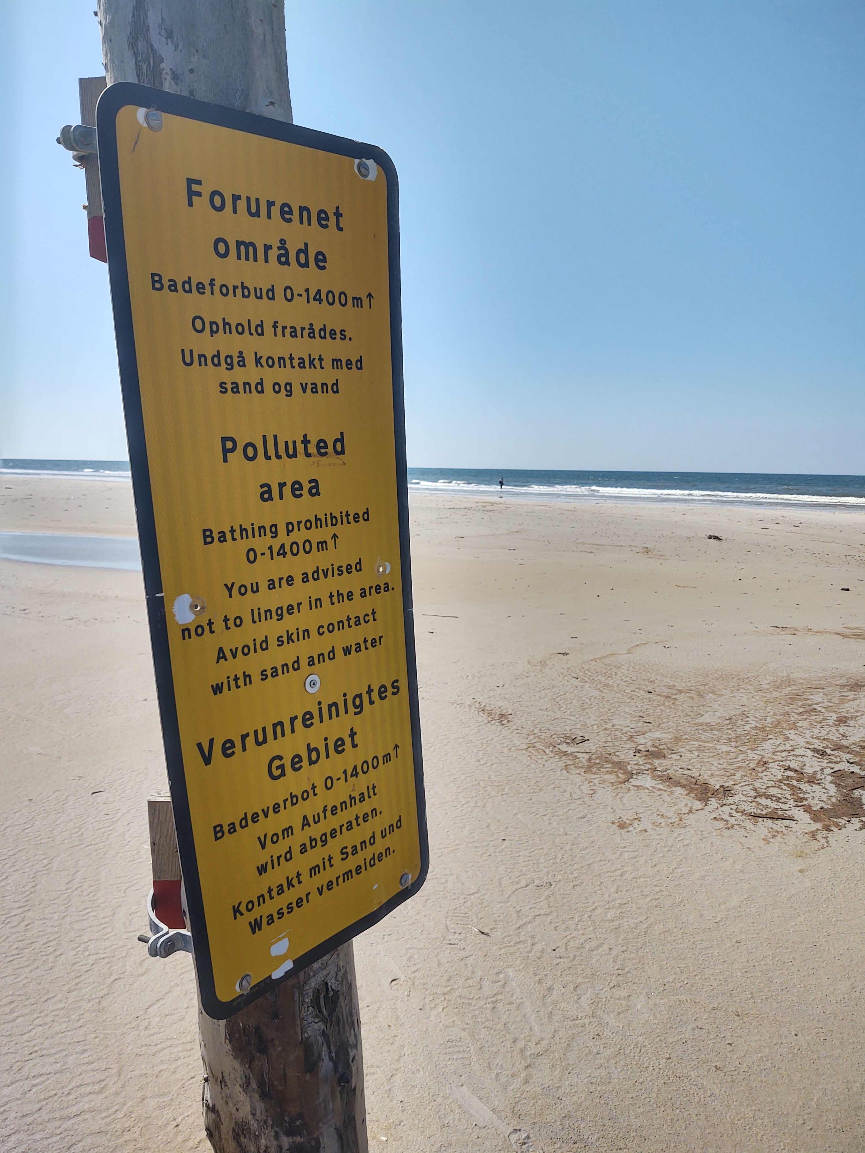 Forurening fra Grindstedværket på strand nær Kærgård Klitplantage ved Vesterhavet.